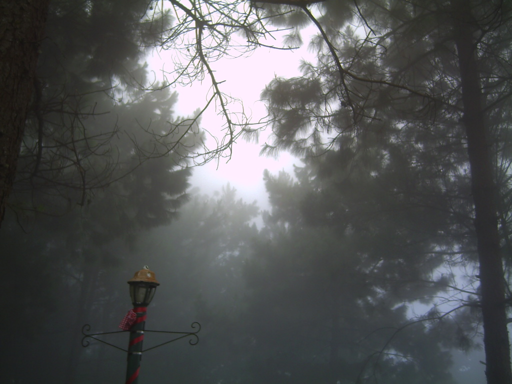 Bosque en Miramundo, Chalatenango